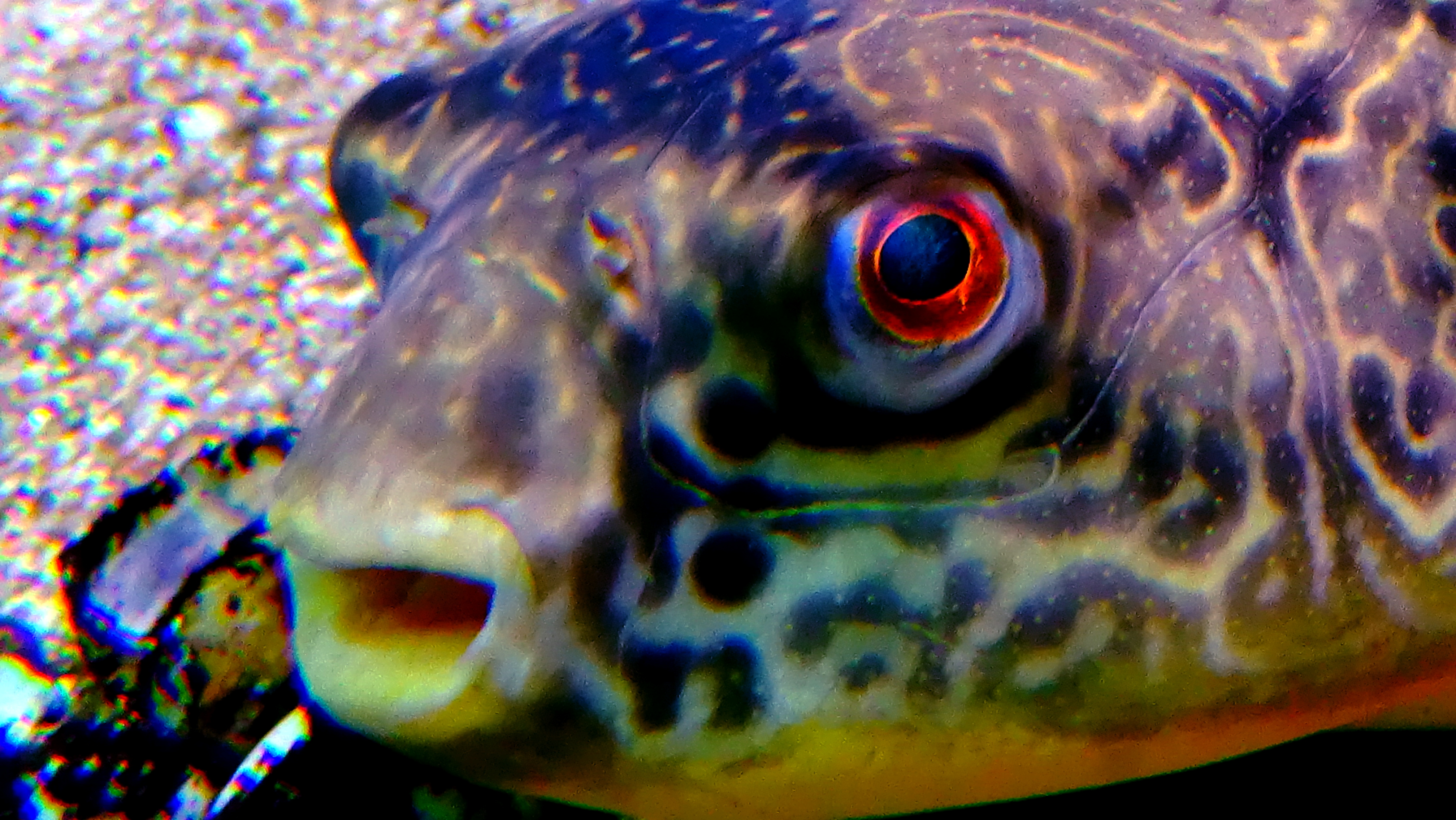 Tetraodon mbu - Aquarium tropicale du palais de la porte dorée, Paris, Ile de France, France - 12/2014